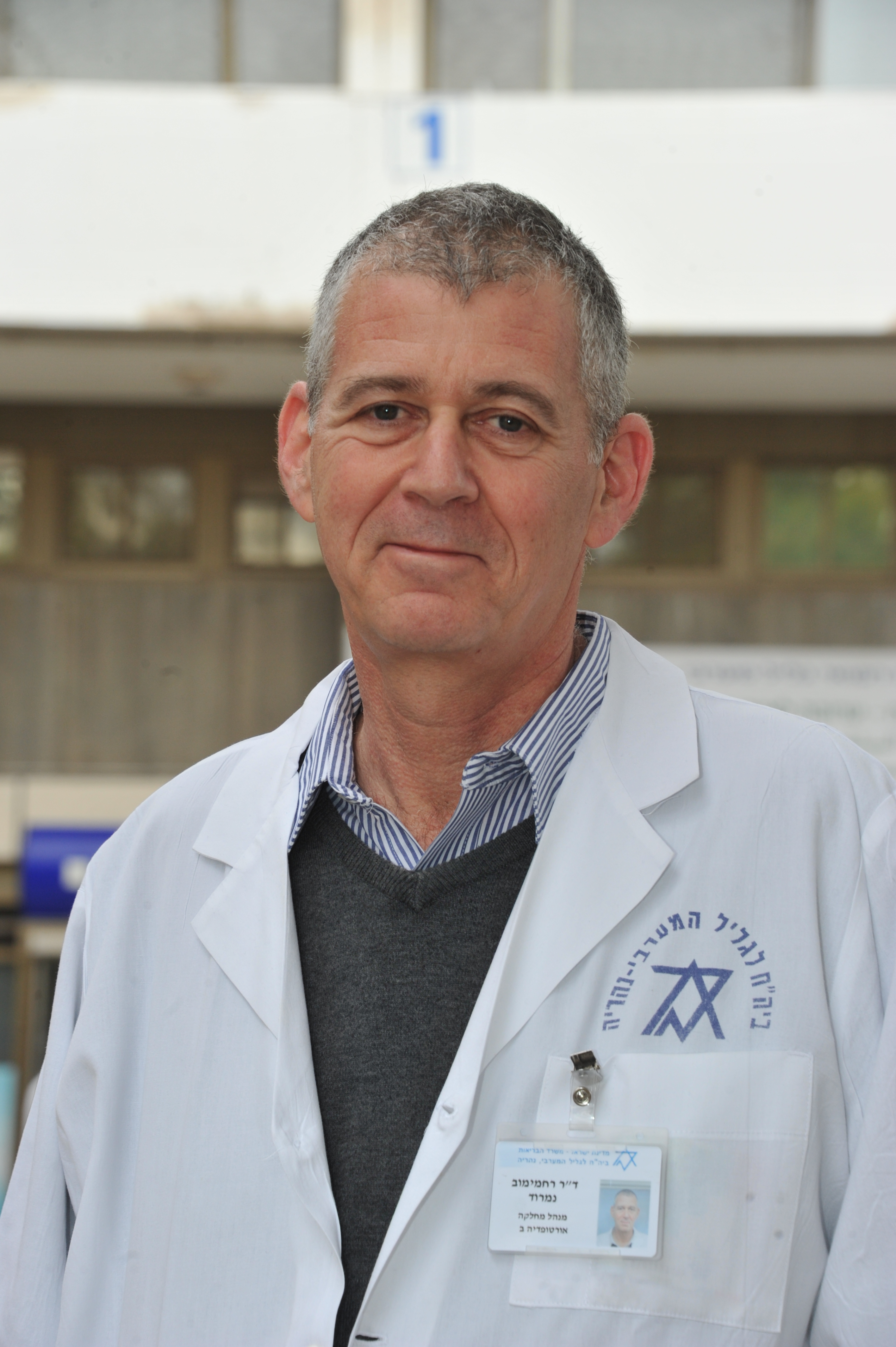 ד"ר רחמימוב במרכז הרפואי לגליל בנהריה